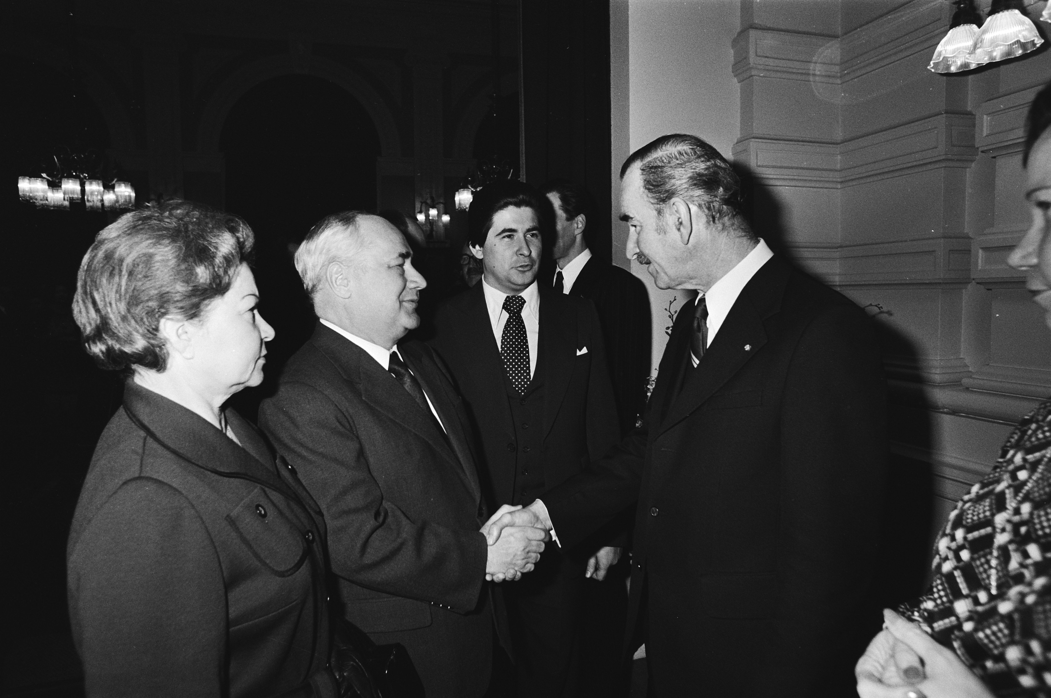 Collectie / Archief : Fotocollectie Anefo Reportage / Serie : [ onbekend ] Beschrijving : Nieuwjaarsreceptie minister v.d. Klaauw (Binnenlandse Zaken); v.d. Klaauw schudt de hand van Russische Ambassadeur Tolstikov Datum : 23 januari 1980 Trefwoorden : Nieuwjaarsrecepties, ambassadeurs Persoonsnaam : Klaauw, Chris van der Fotograaf : Croes, Rob C. / Anefo Auteursrechthebbende : Nationaal Archief Materiaalsoort : Negatief (zwart/wit) Nummer archiefinventaris : bekijk toegang 2.24.01.05 Bestanddeelnummer : 930-6356